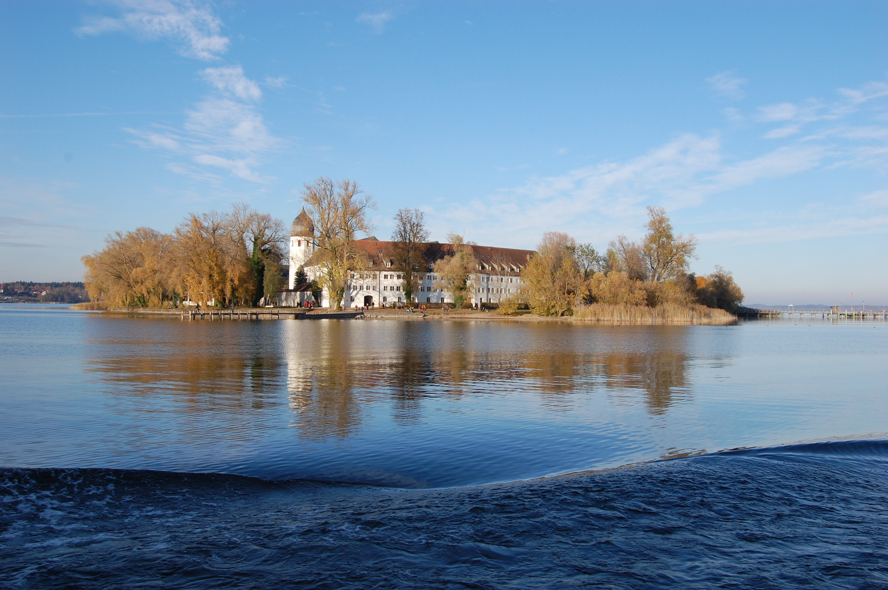 Insel Frauenchiemsee im November 2009